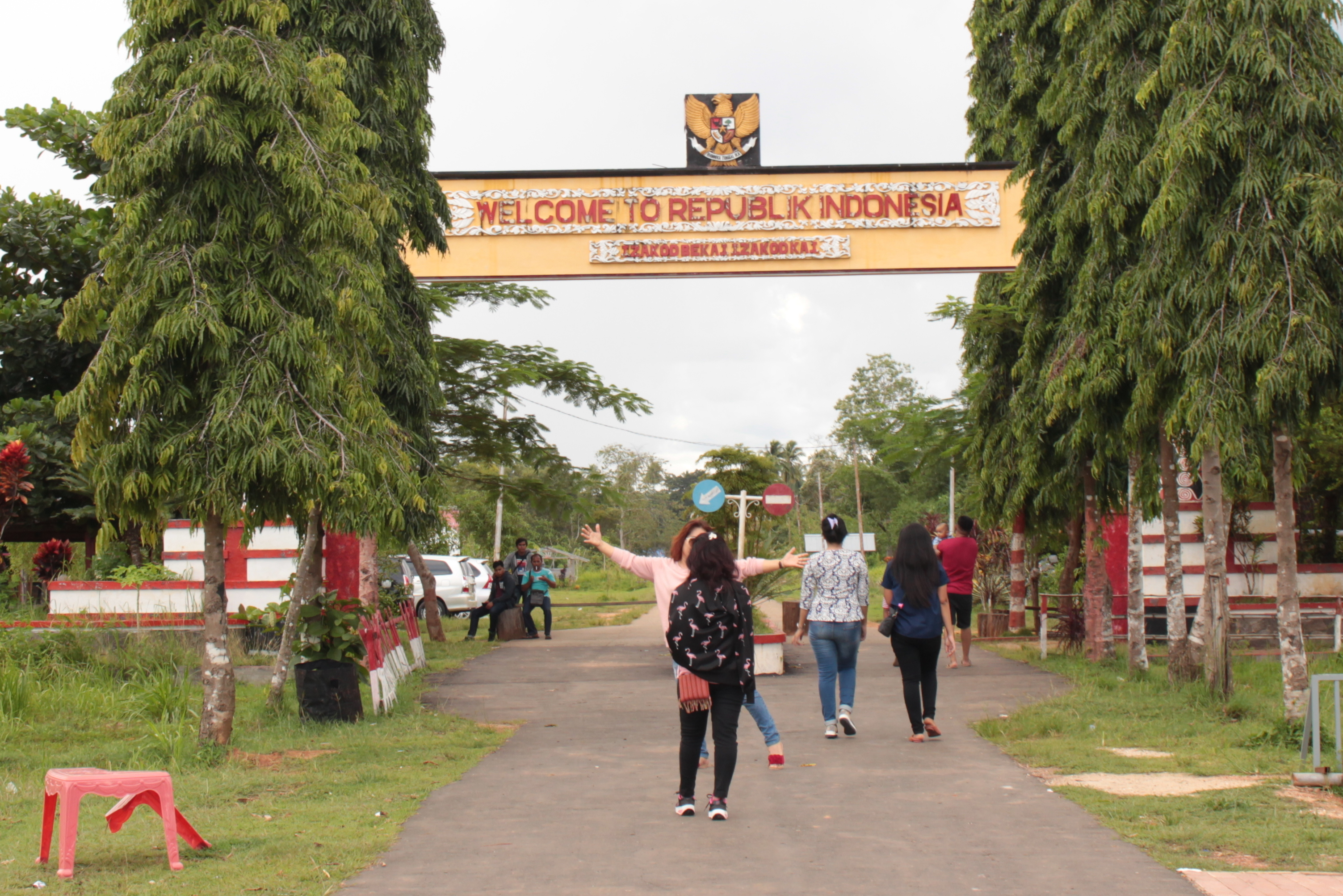 Gapura perbatasan Indonesia-Papua New Guinea di Distrik Sota, Merauke, Papua.